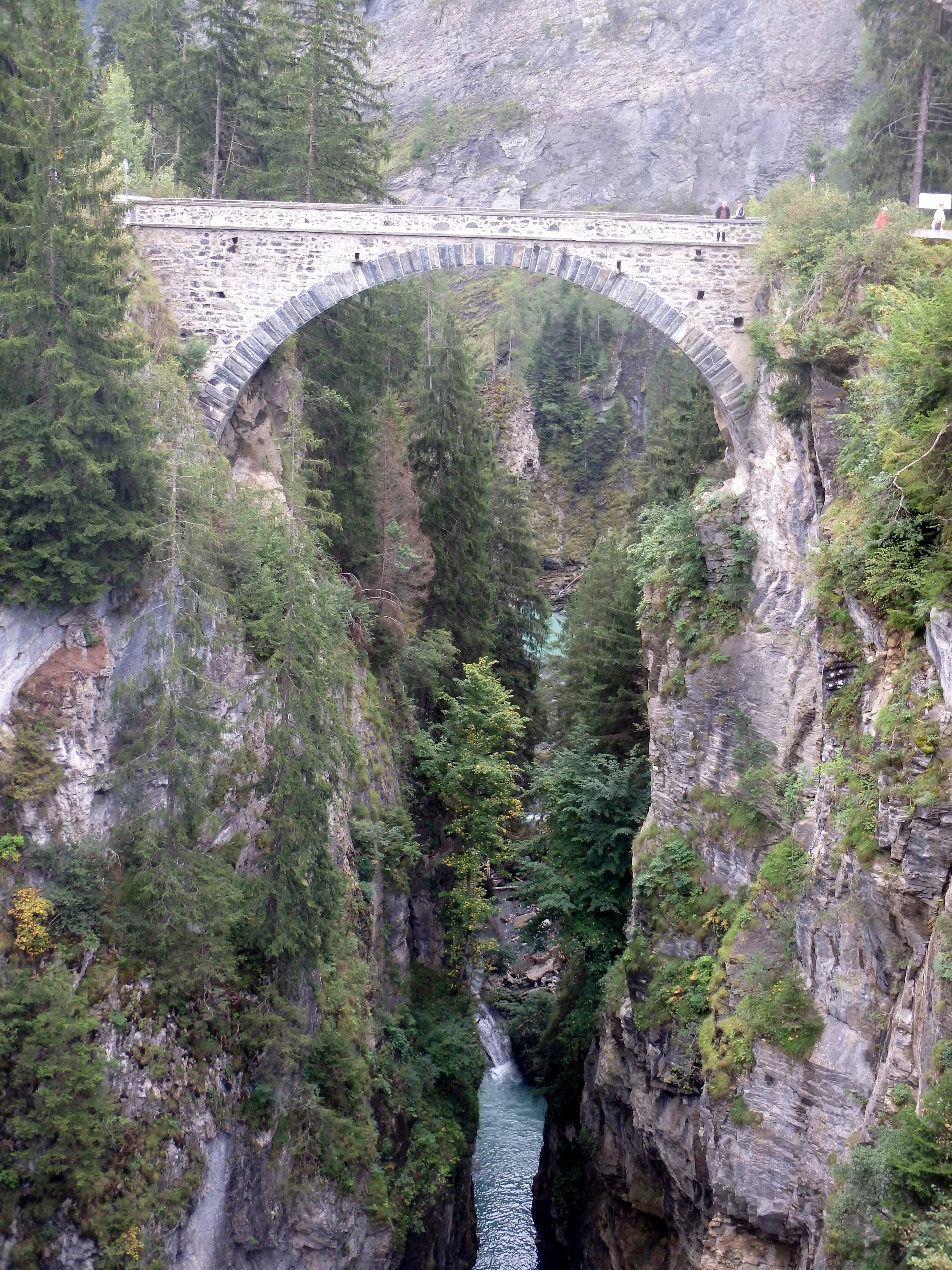 Die heutige alte Steinbogenbrücke wurde vermutlich 1869 erbaut und ersetzte damals eine gedeckte Holzbrücke. Die Soliserbrücke ist die älteste Brücke an dieser engen Stellen neben der Strassenbrücke von 1970 und dem Soliser Viadukt der Rhätischen Bahn (RhB) von 1902.